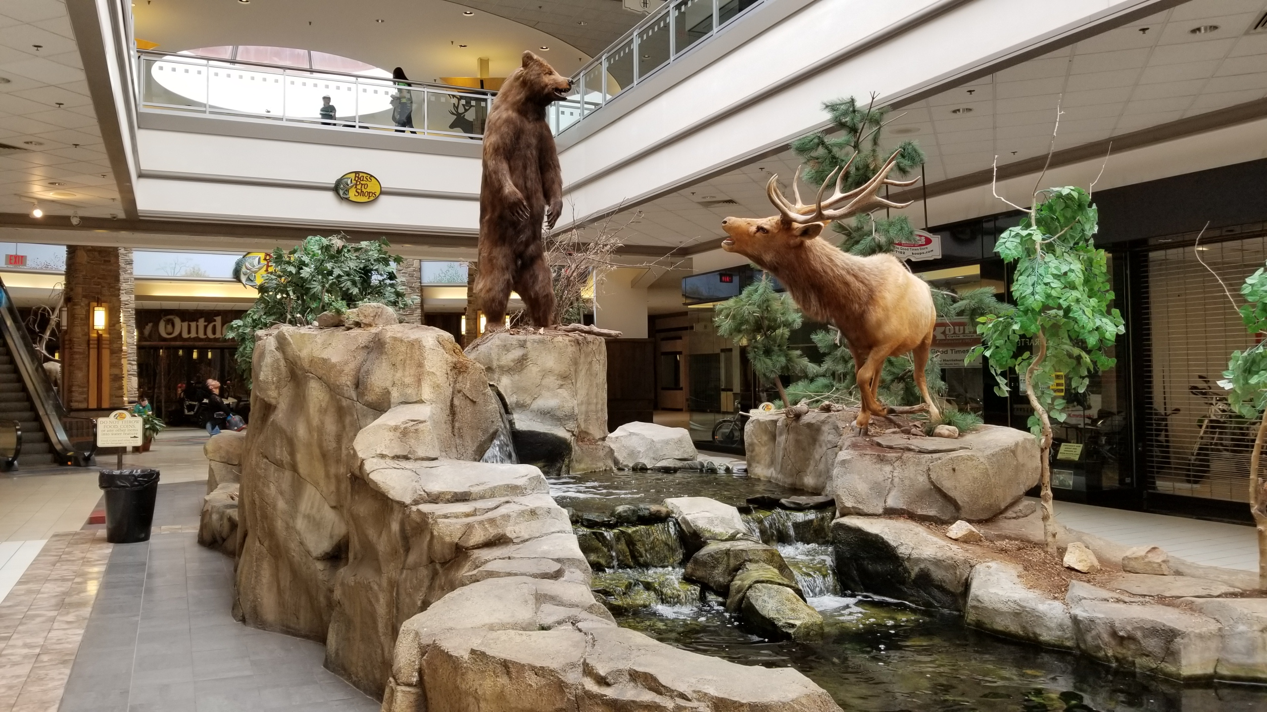 Bass Pro Shops - Harrisburg Mall Harrisburg, PA March 2018